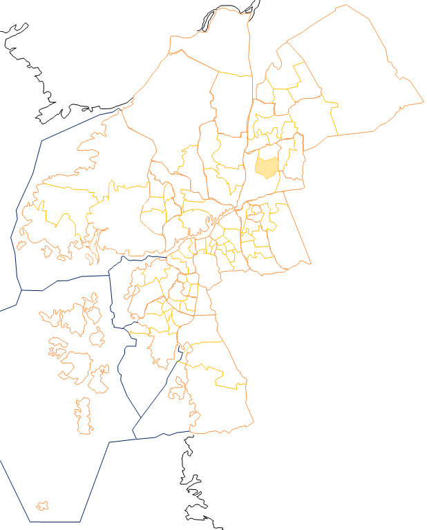 Karta som visar primärområdes belägenhet i Göteborg